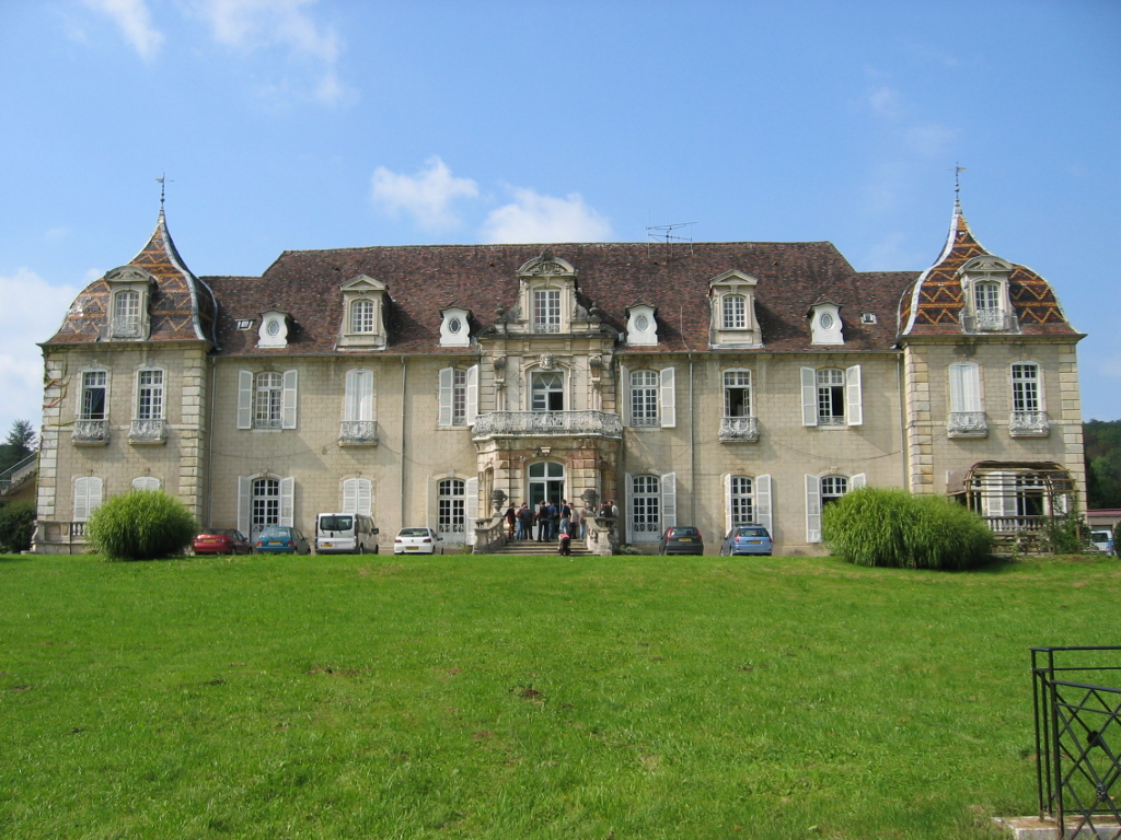 Chateau de Novillars dans le Doubs